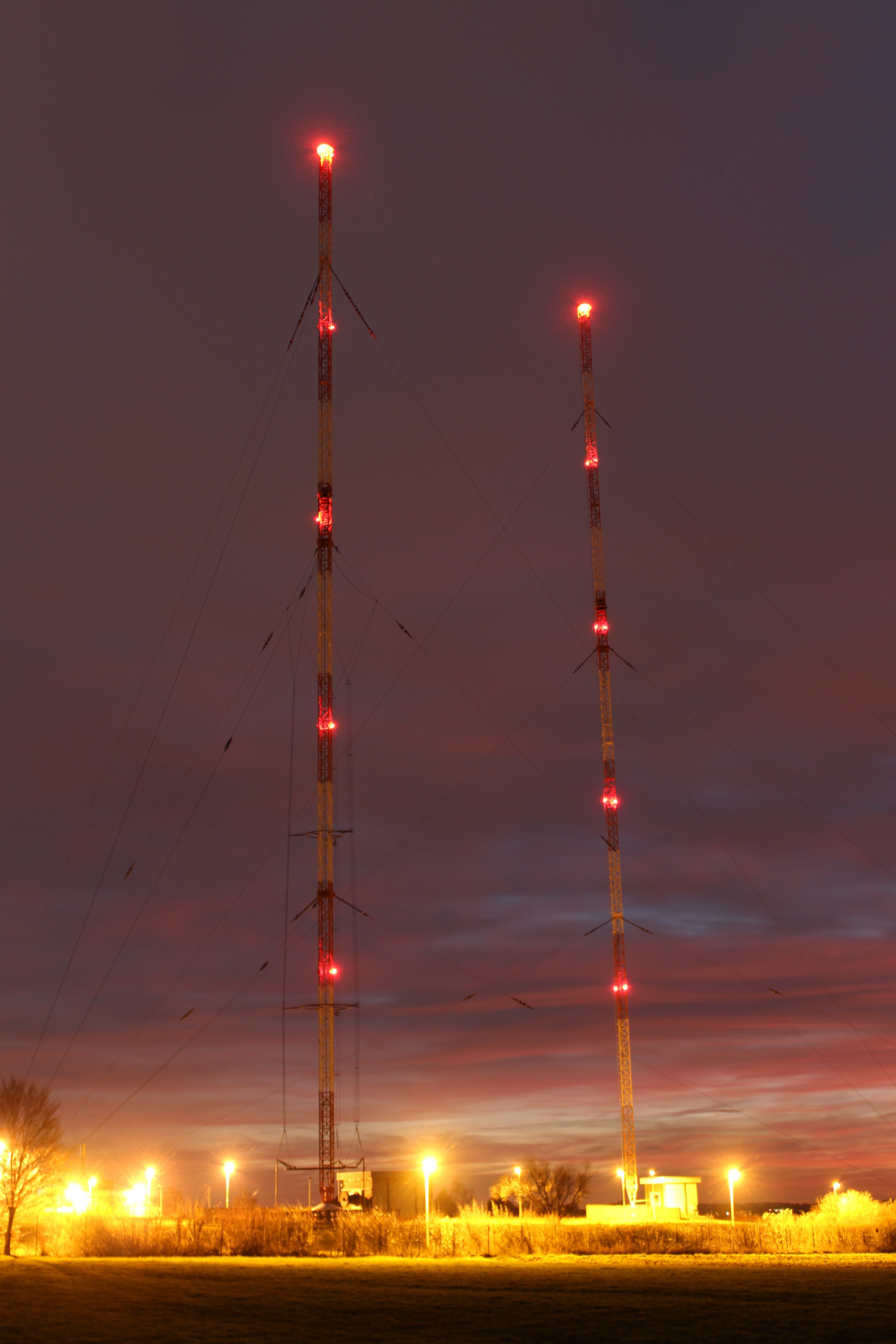 Hauptsendemasten des Senders Heusweiler bei Nacht